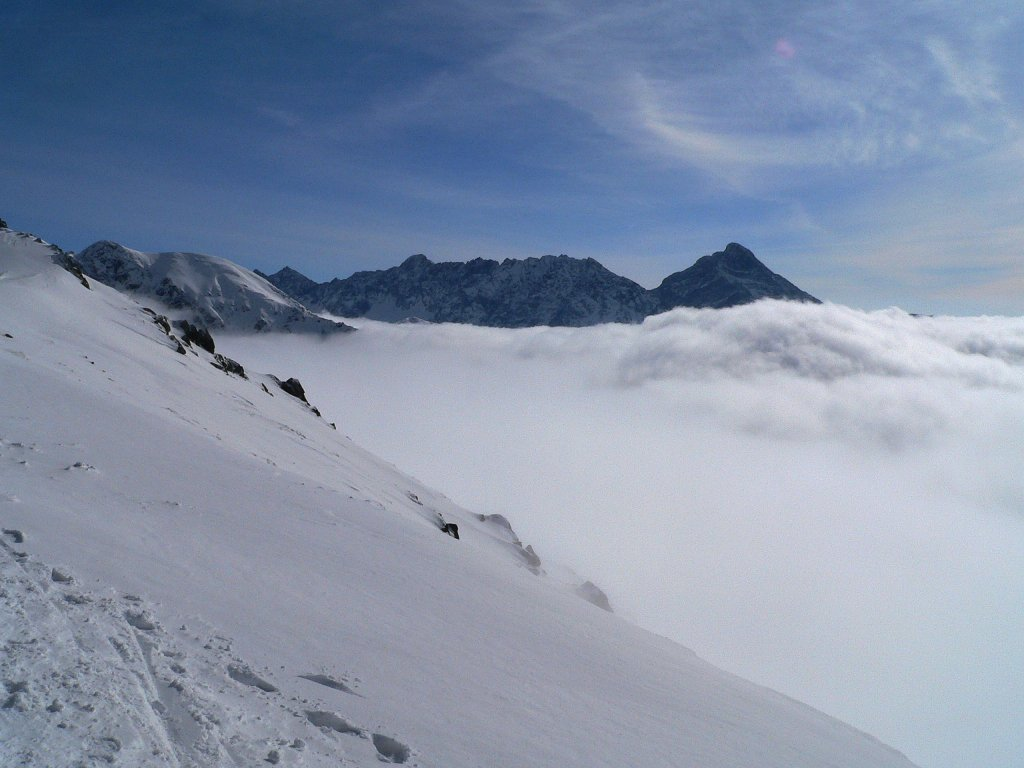 Krywań i zjawisko morza chmur widziane z grani między Świnicą a Kasprowym Wierchem.